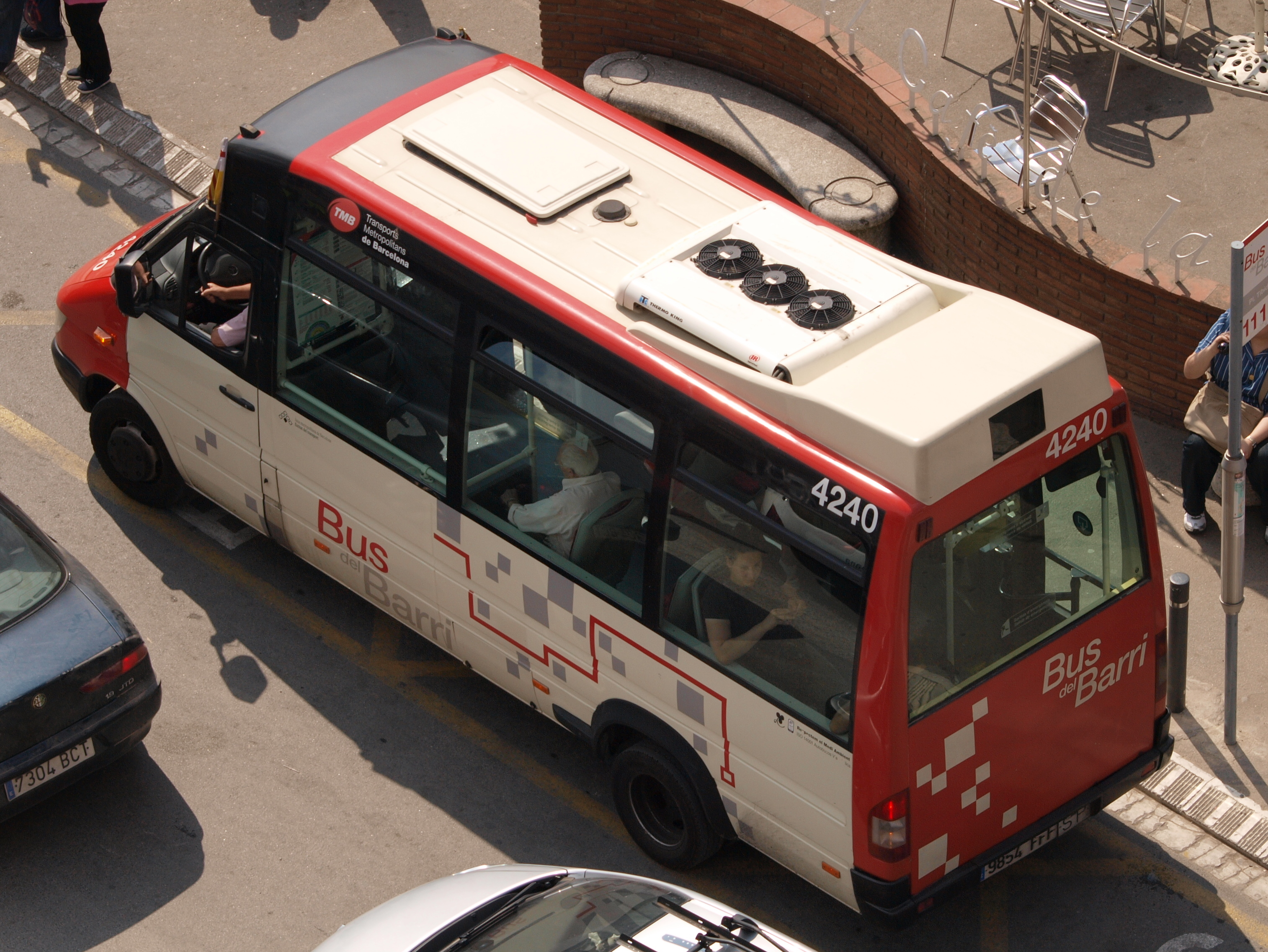 Photographed at Barcelona. TMBTransport Metropolitans de Barcelona, Bus del Barri.